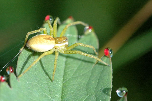 juvenile Dolomedes sp. from Commanster, Belgian High Ardennes .